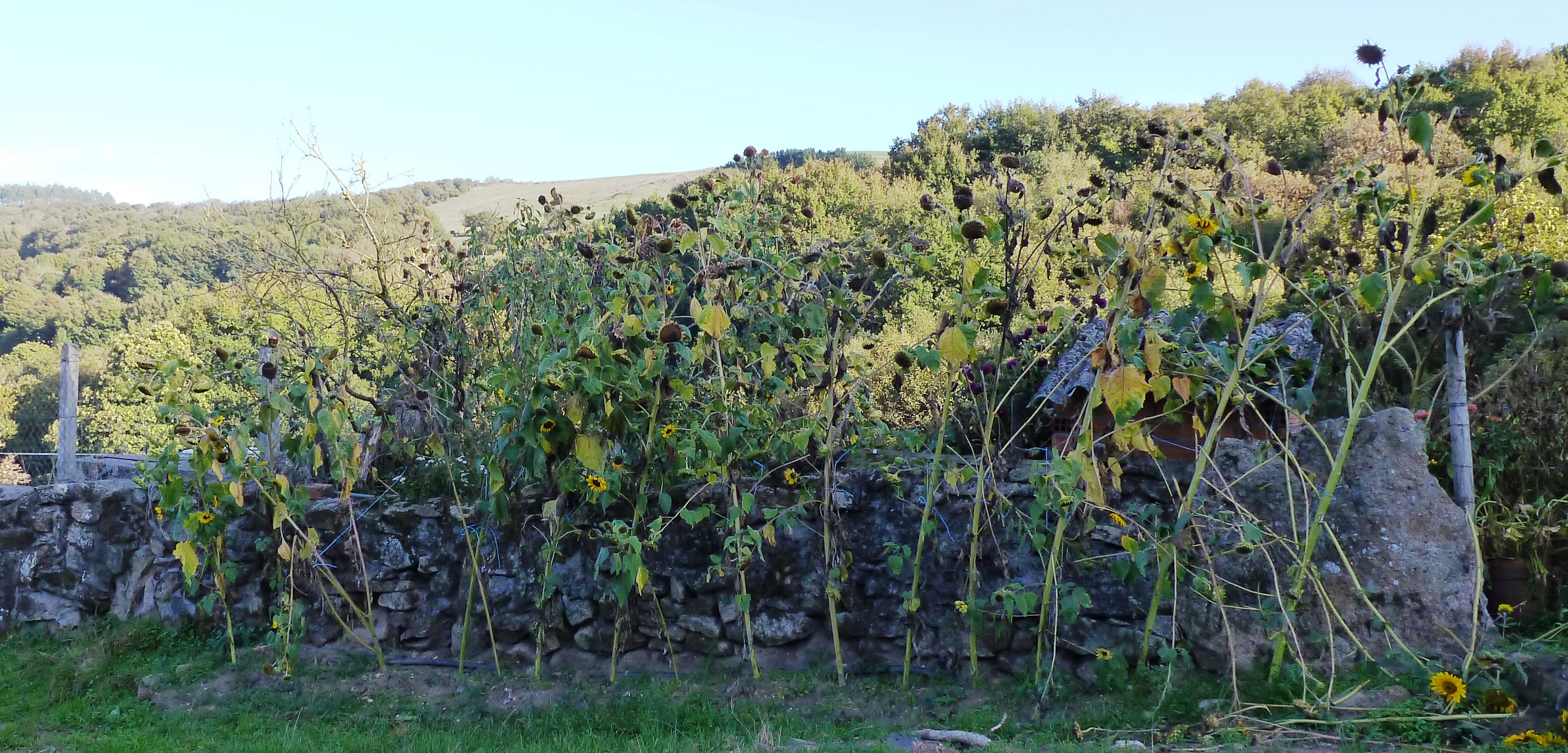 Plantas de xirasol na entrada de Cas de Pedro